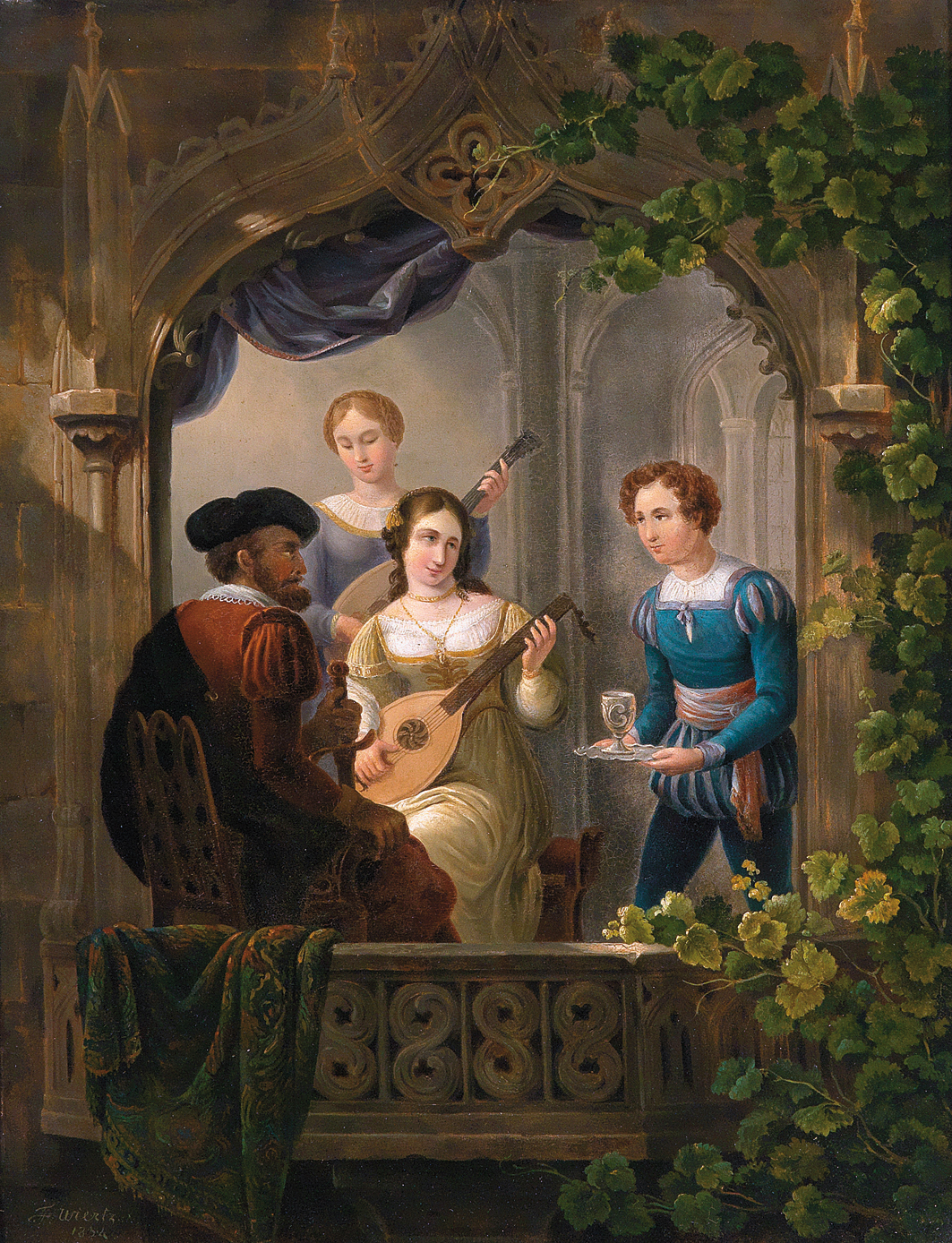 Musikalische Unterhaltung am Balkon, signiert und datiert F. H. Wiertz (ligiert) 1834, Öl auf Holz,60 x 45,5 cm